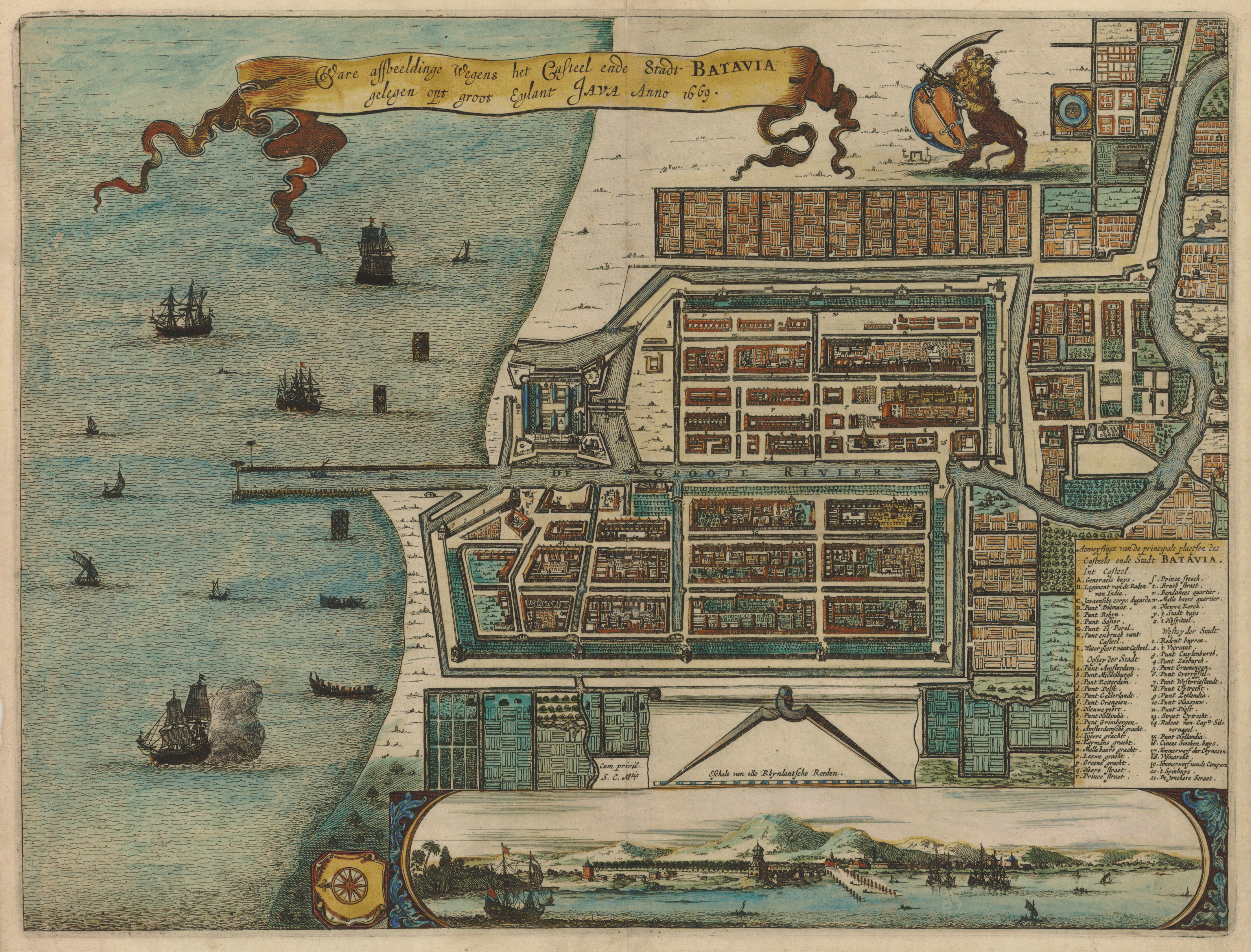 Waere affbeeldinge Wegens het Casteel ende Stadt BATAVIA gelegen opt groot Eylant JAVA Anno 1669